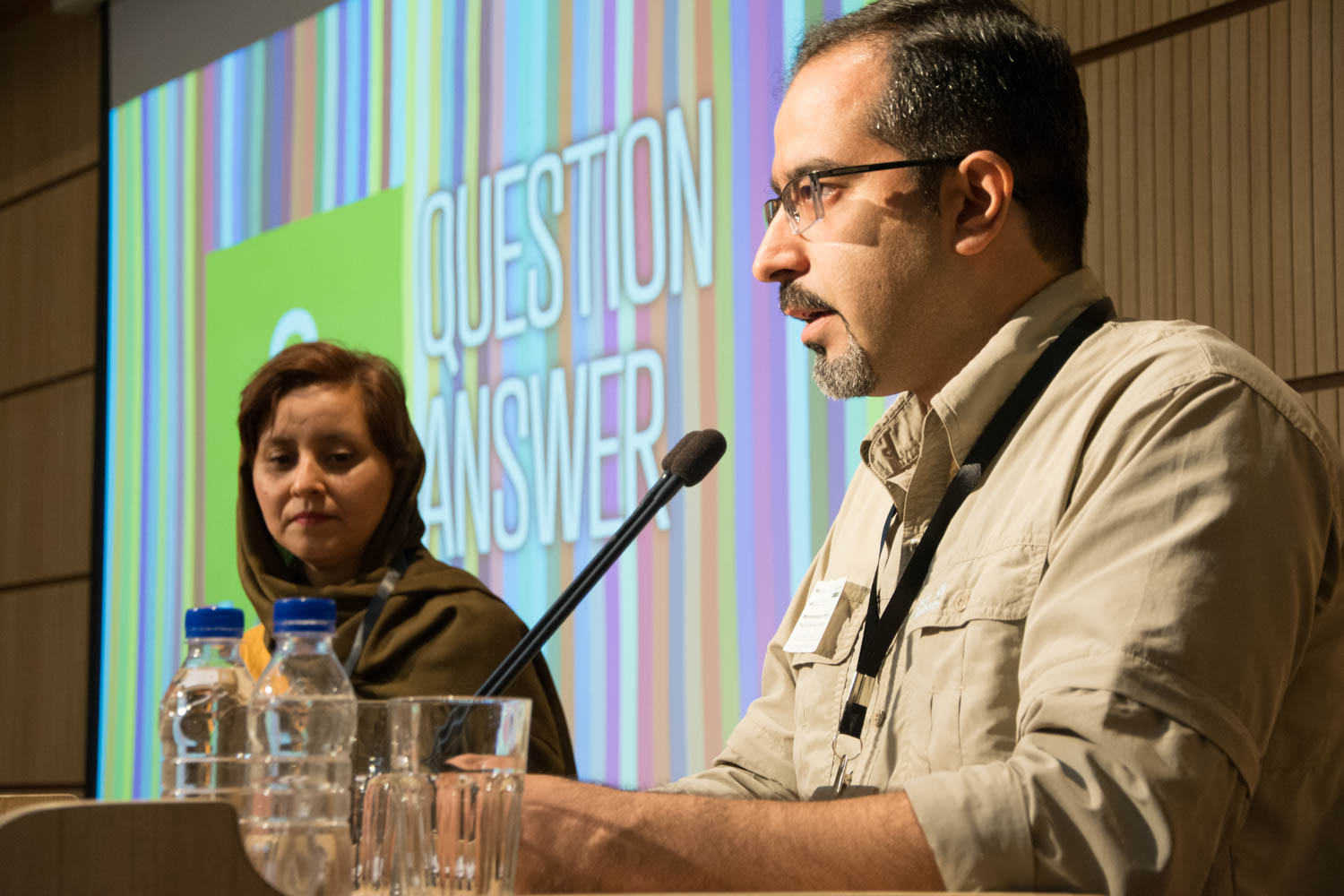 سخنرانی آقای مرتضی اسلامی دهکردی مدیرعامل اسبق انجمن یوزپلنگ ایرانی در سومین رویداد صبح خلاق تهران